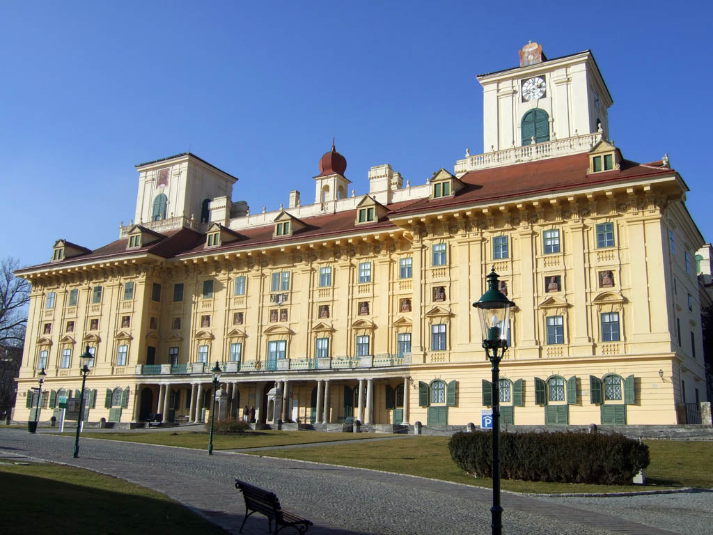 Eisenstadt, Schloss Esterházy